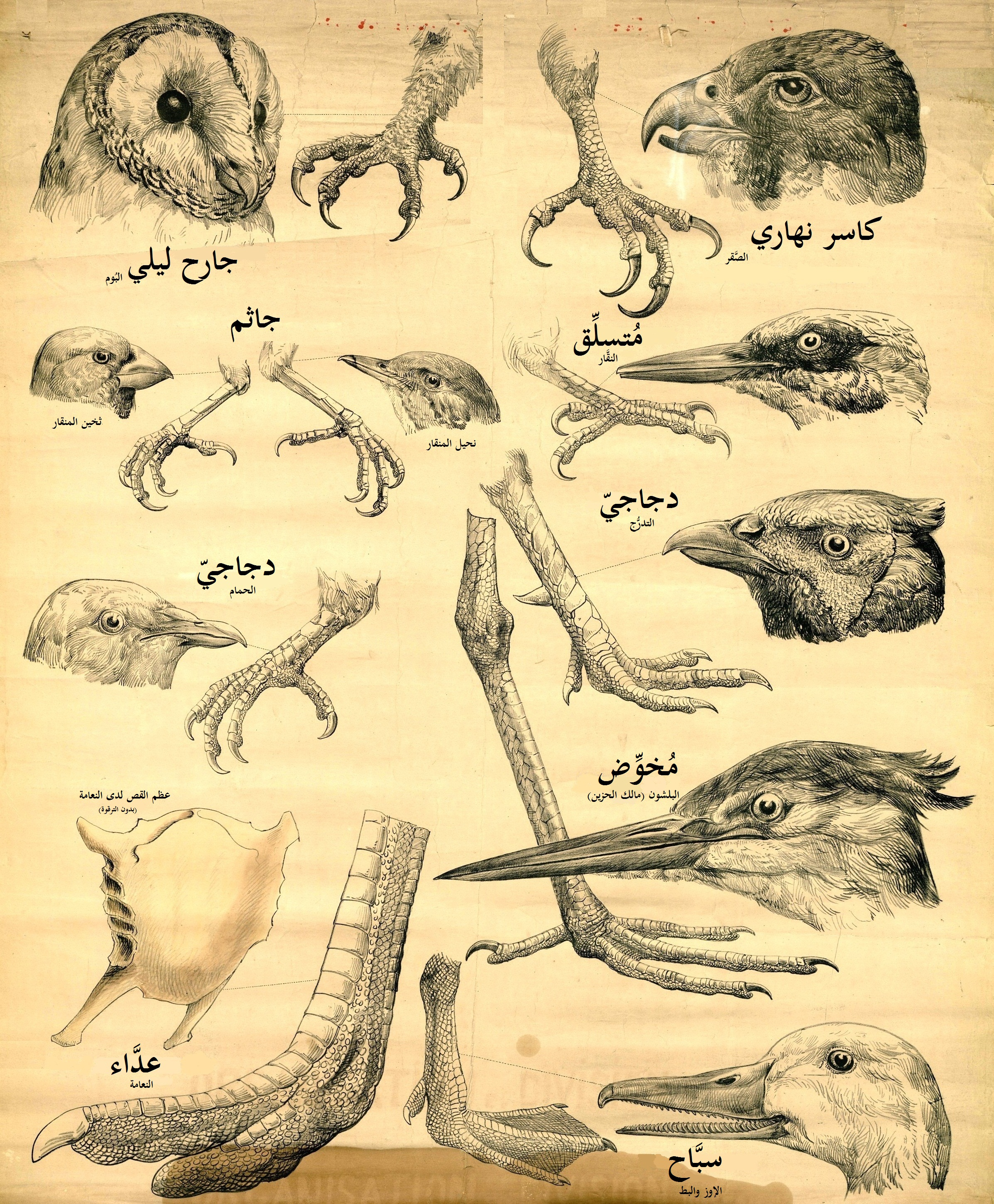 طبيعة تفرُّعات الطُيُور. المكتبة الرقميَّة في جامعة ارتواز. Retrieved on 26 آذار (مارس) 2016. الكتاب بِاللُغة الفرنسيَّة.